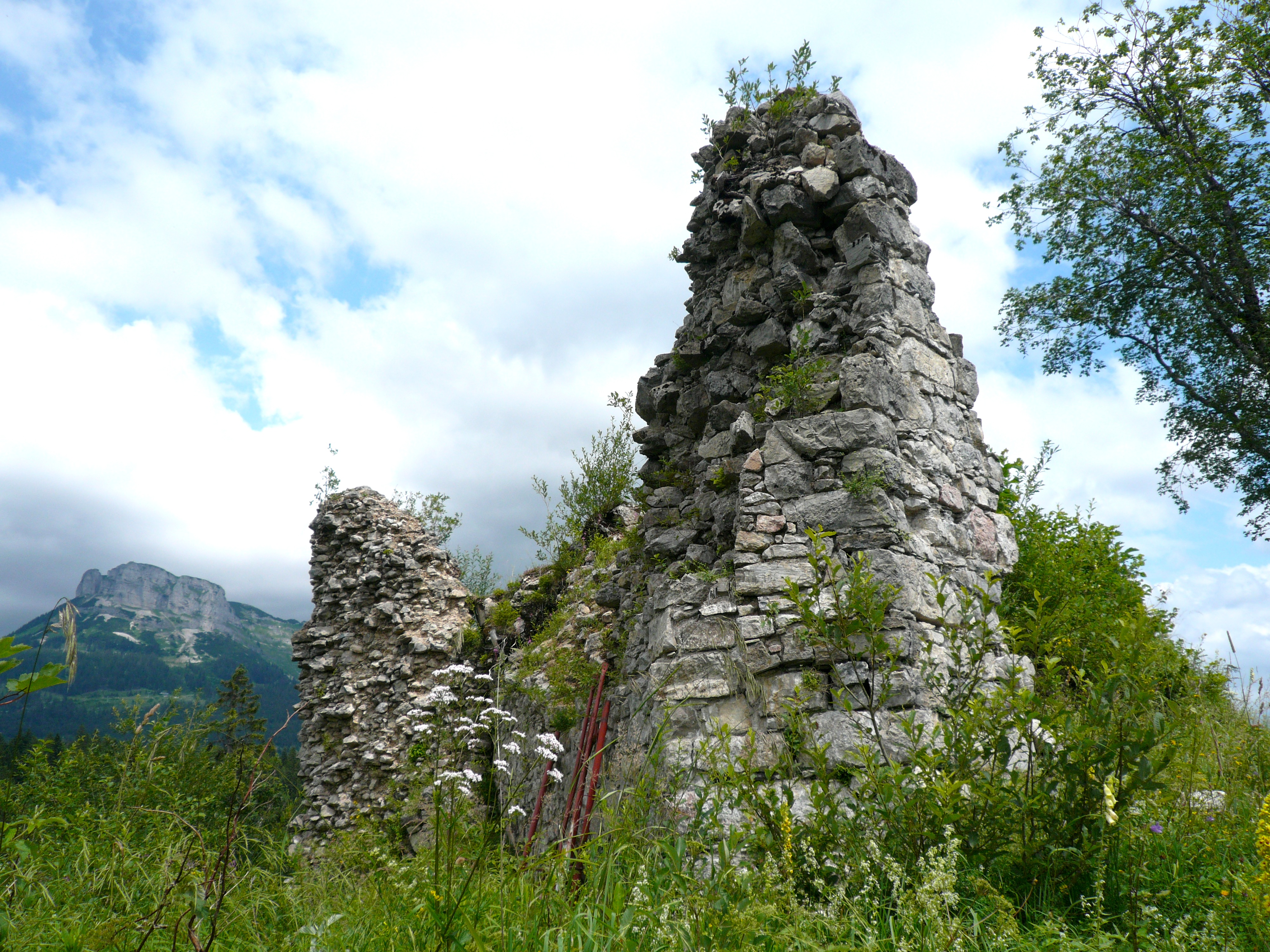 Burgruine Pflindsberg in Altaussee, Austria